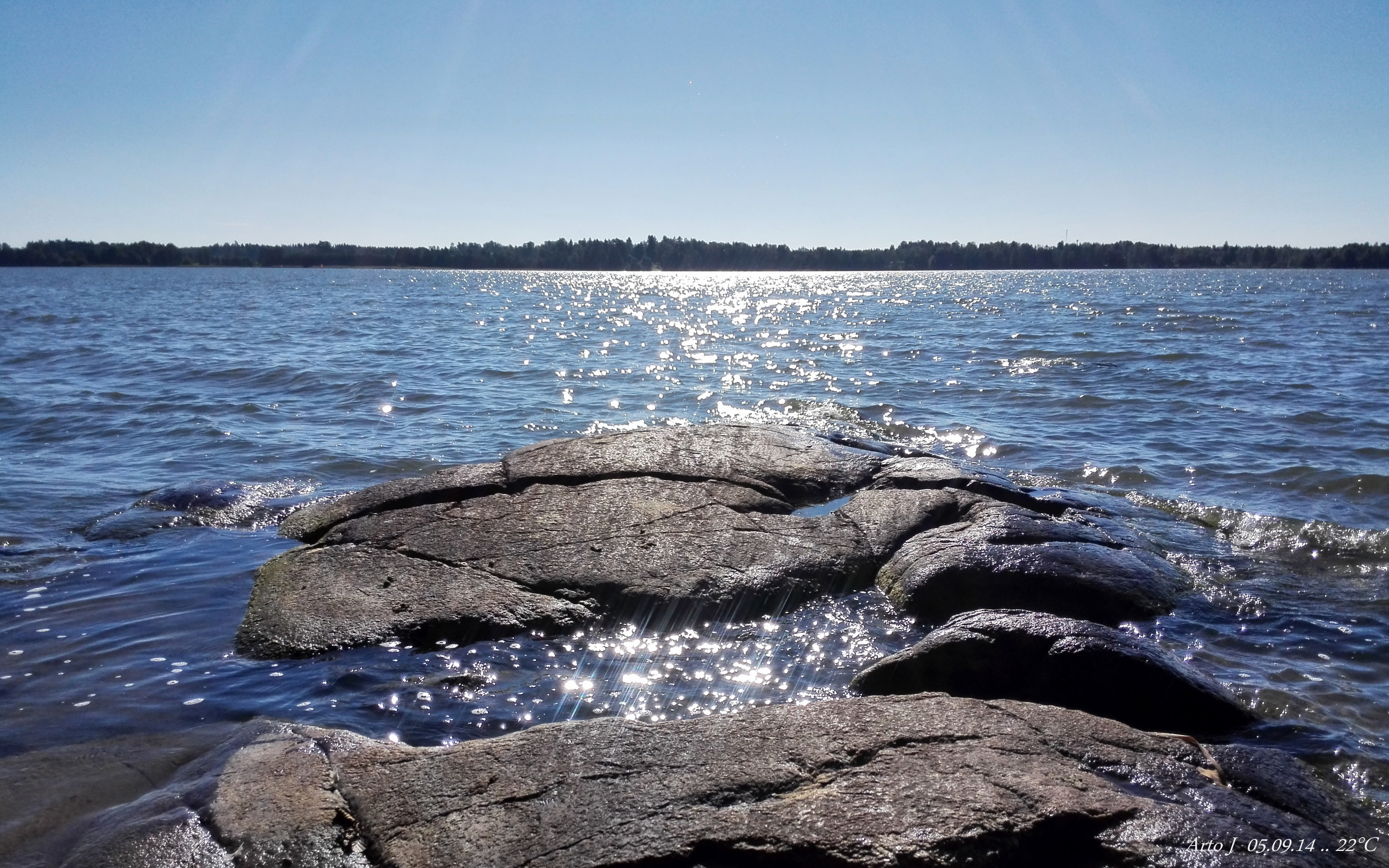 Järvenpää / Vanhankylänniemi